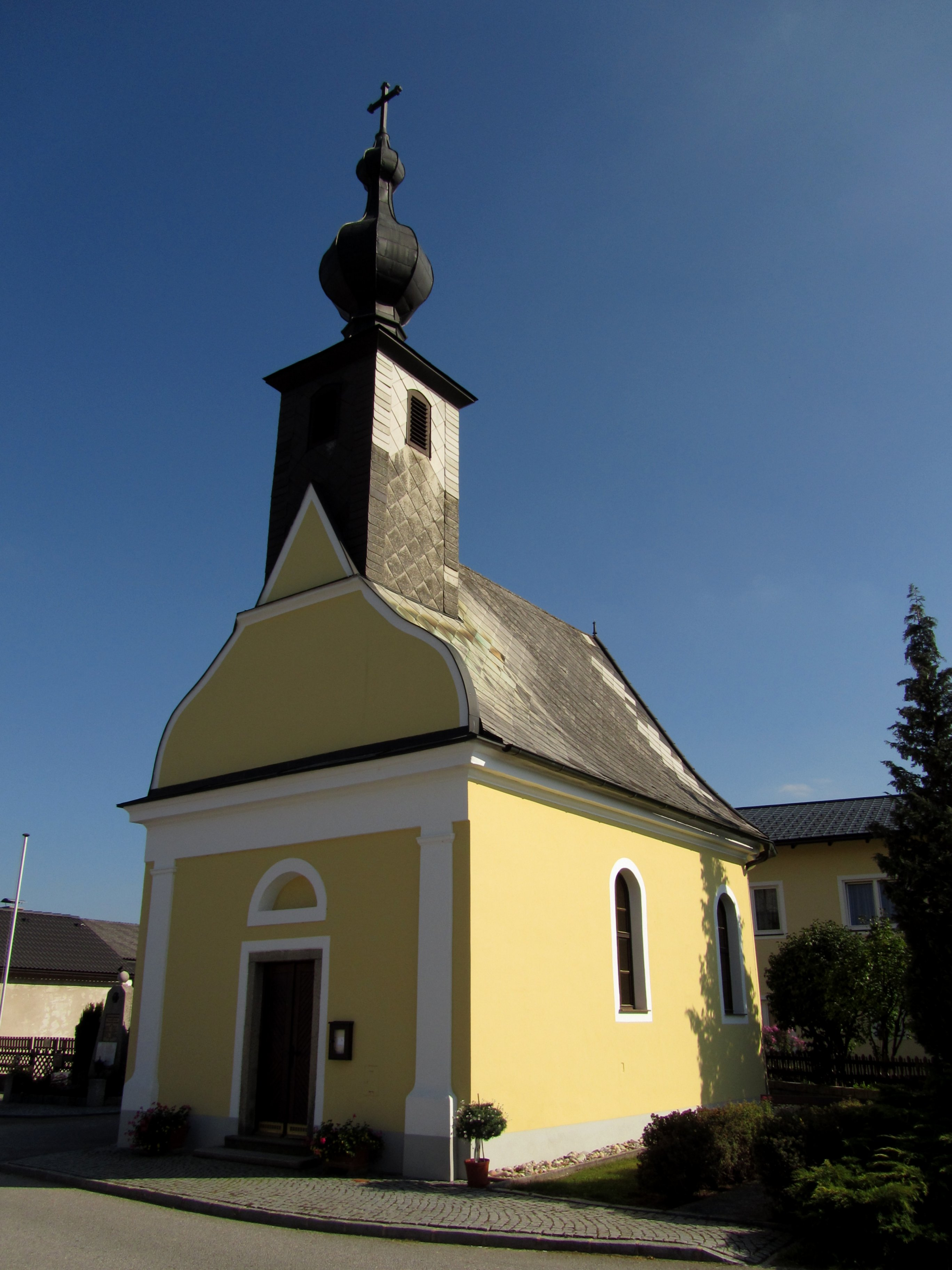 Ortskapelle Hl. Dreifaltigkeit